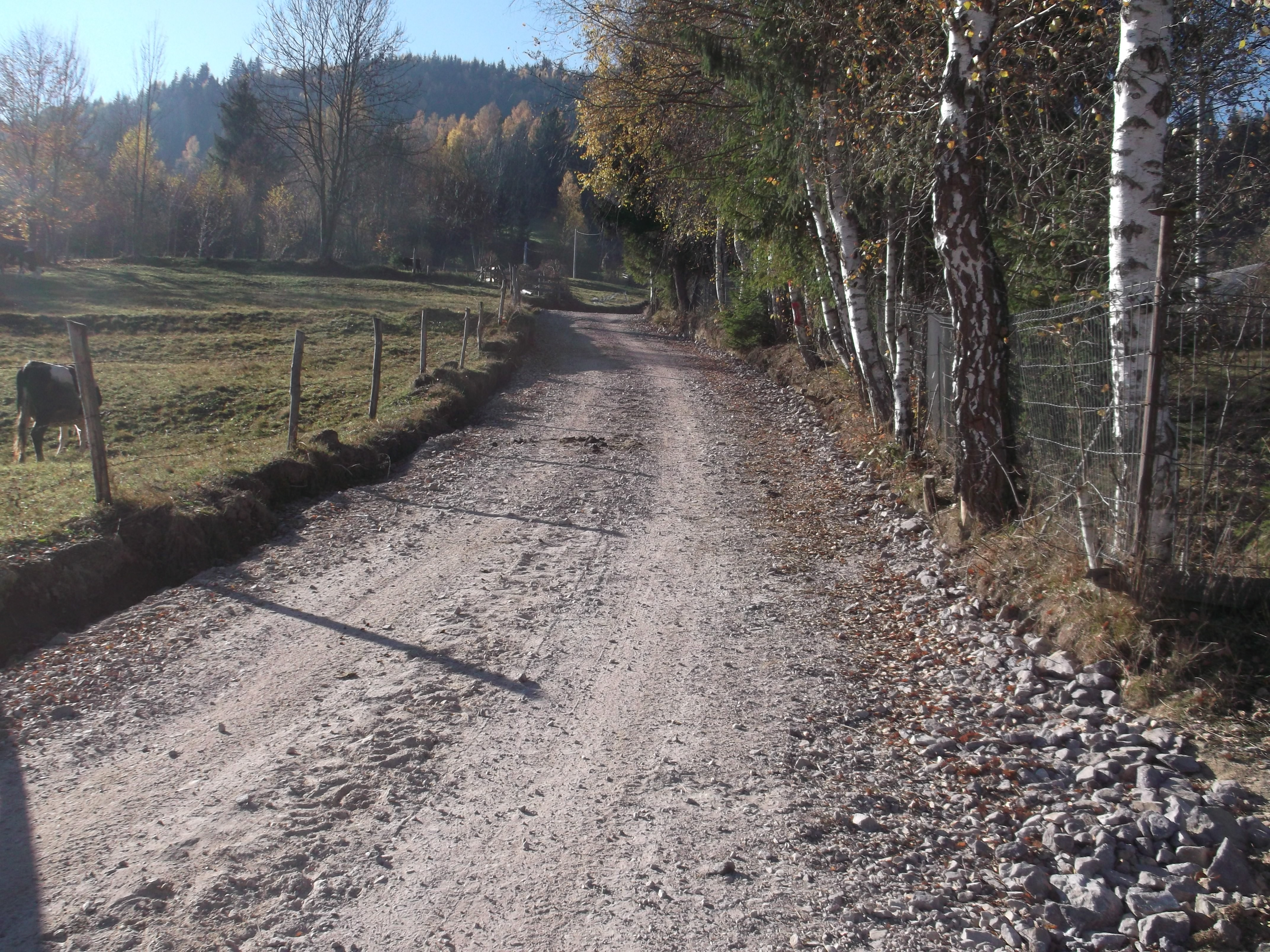 Drumul spre casa lui Horea din Fericet , pavat partial cu piatra in perioada septembrie - octombrie 2015